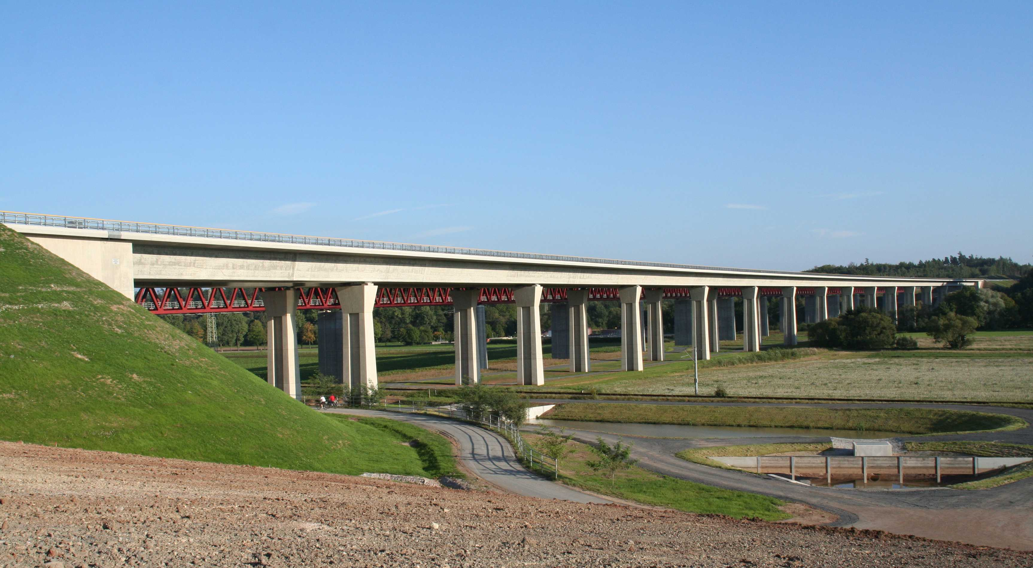 Itztalbrücke bei Coburg